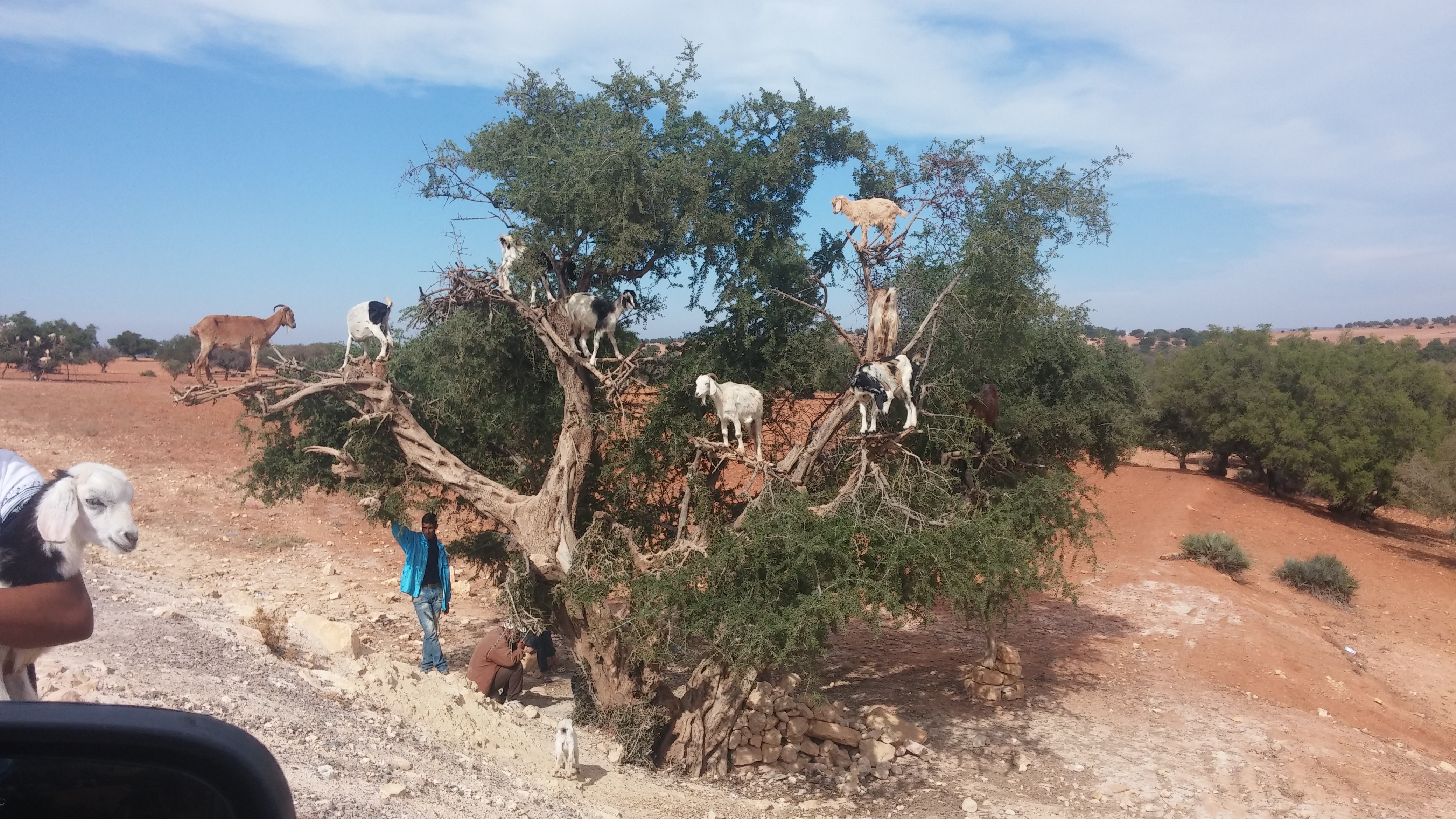 עזים מטפסות על עץ שמן ארגן